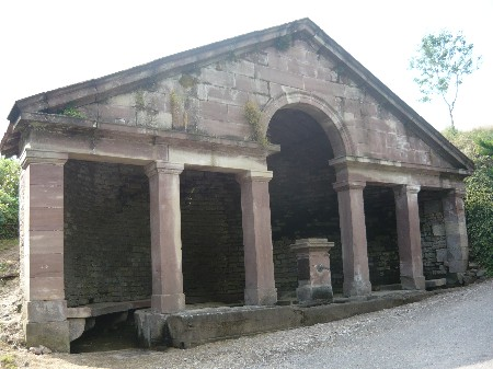 Lavoir communal de Montmotier, XIXème